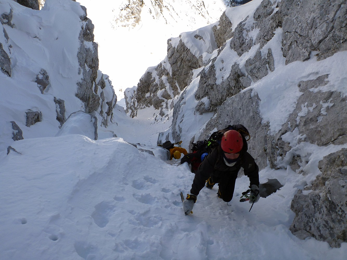 Pripravniška grapa